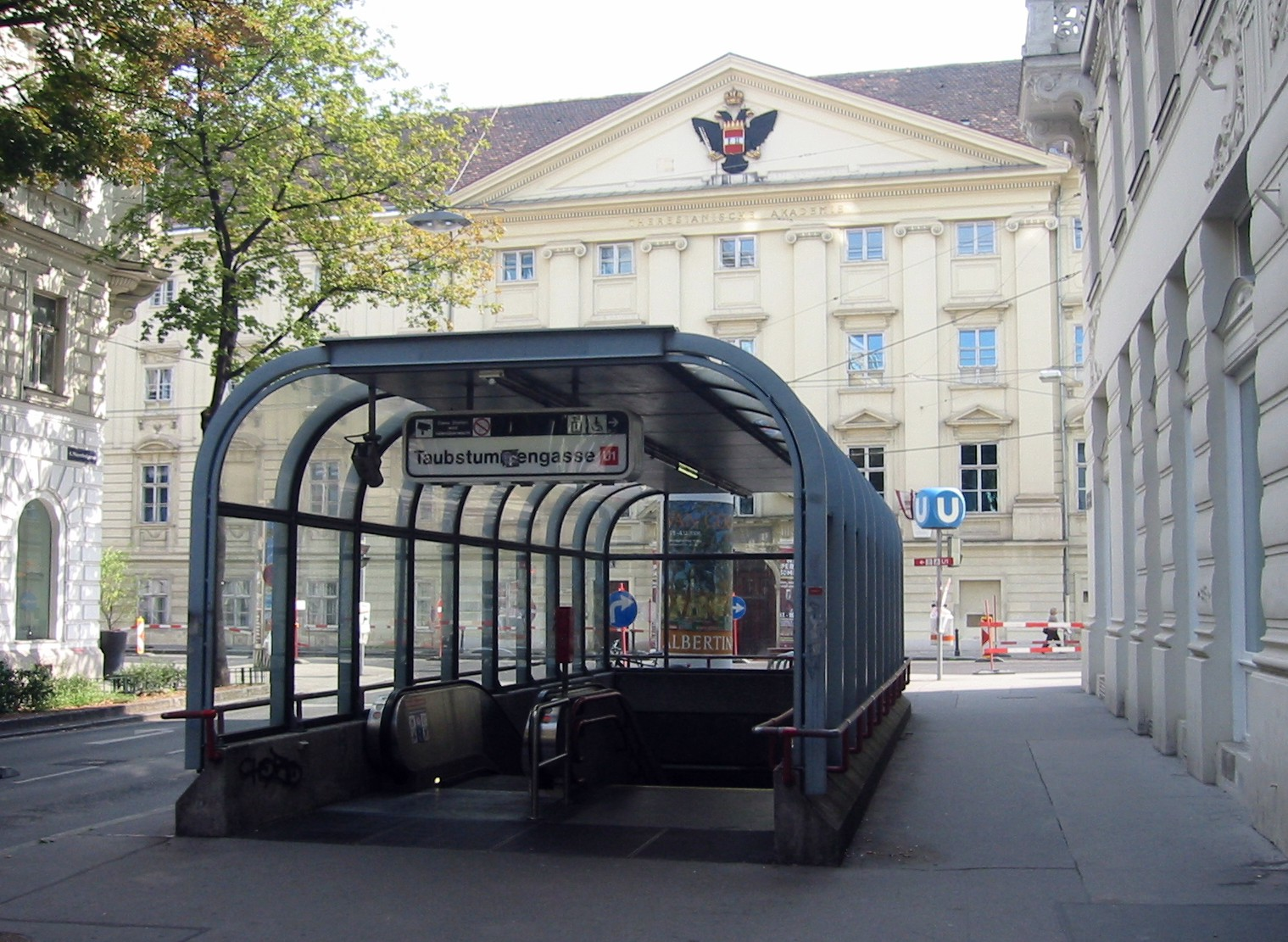 Wien, U-Bahn-Station Taubstummengasse